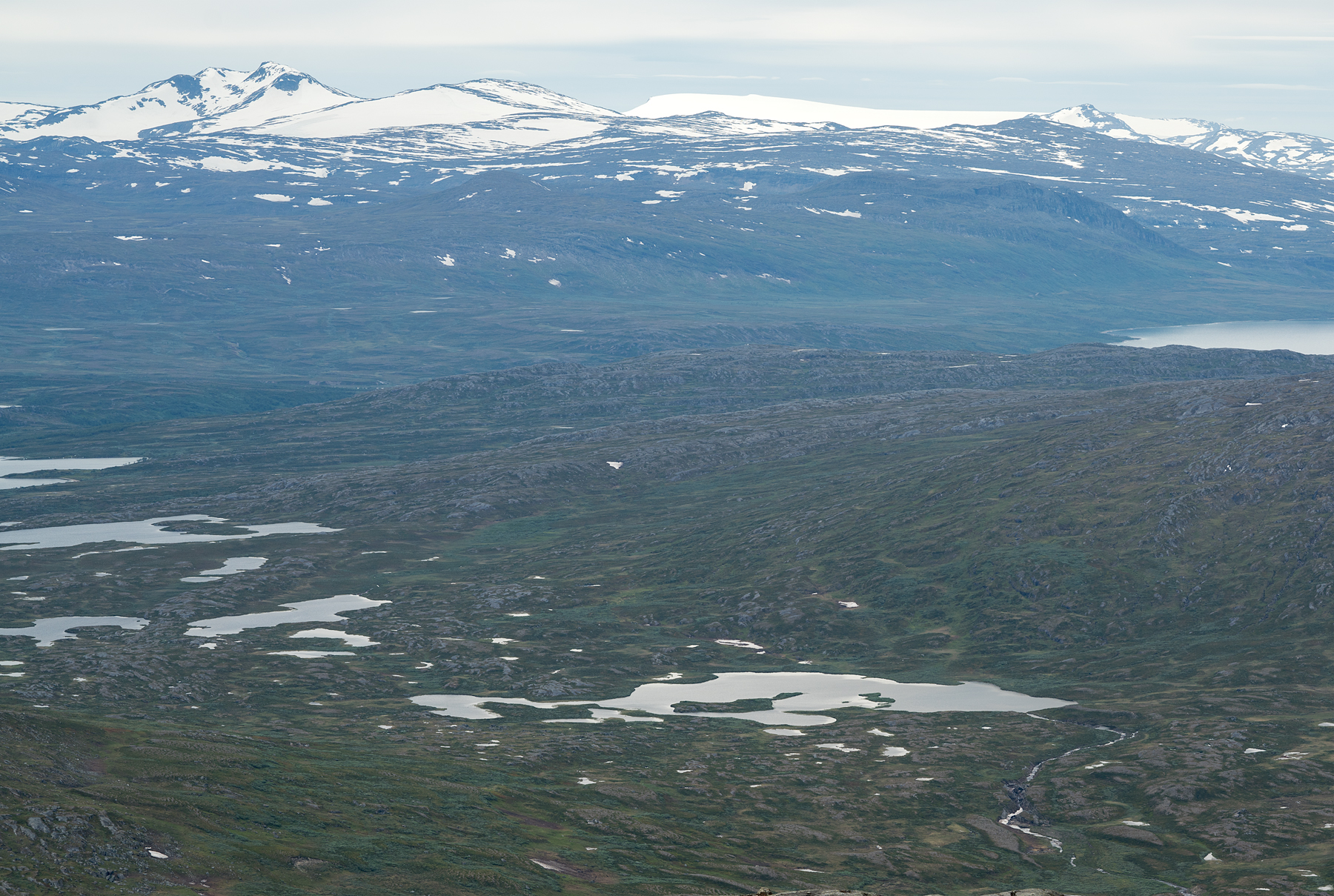 Sjön längst ner i bild är Njallajávrásj. Vy från 1430 på Álátjåhkkå.